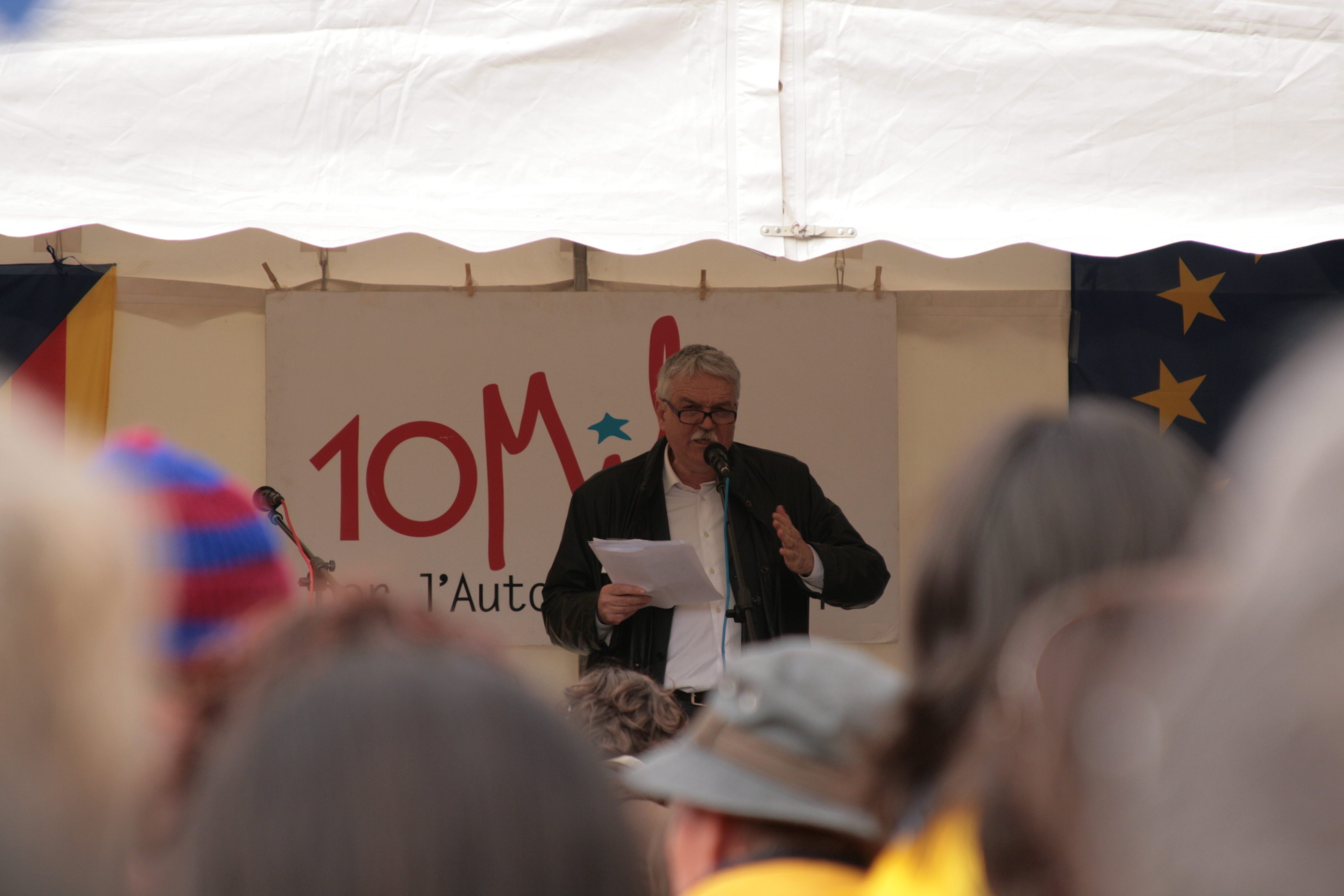 Toni Strubell i Trueta